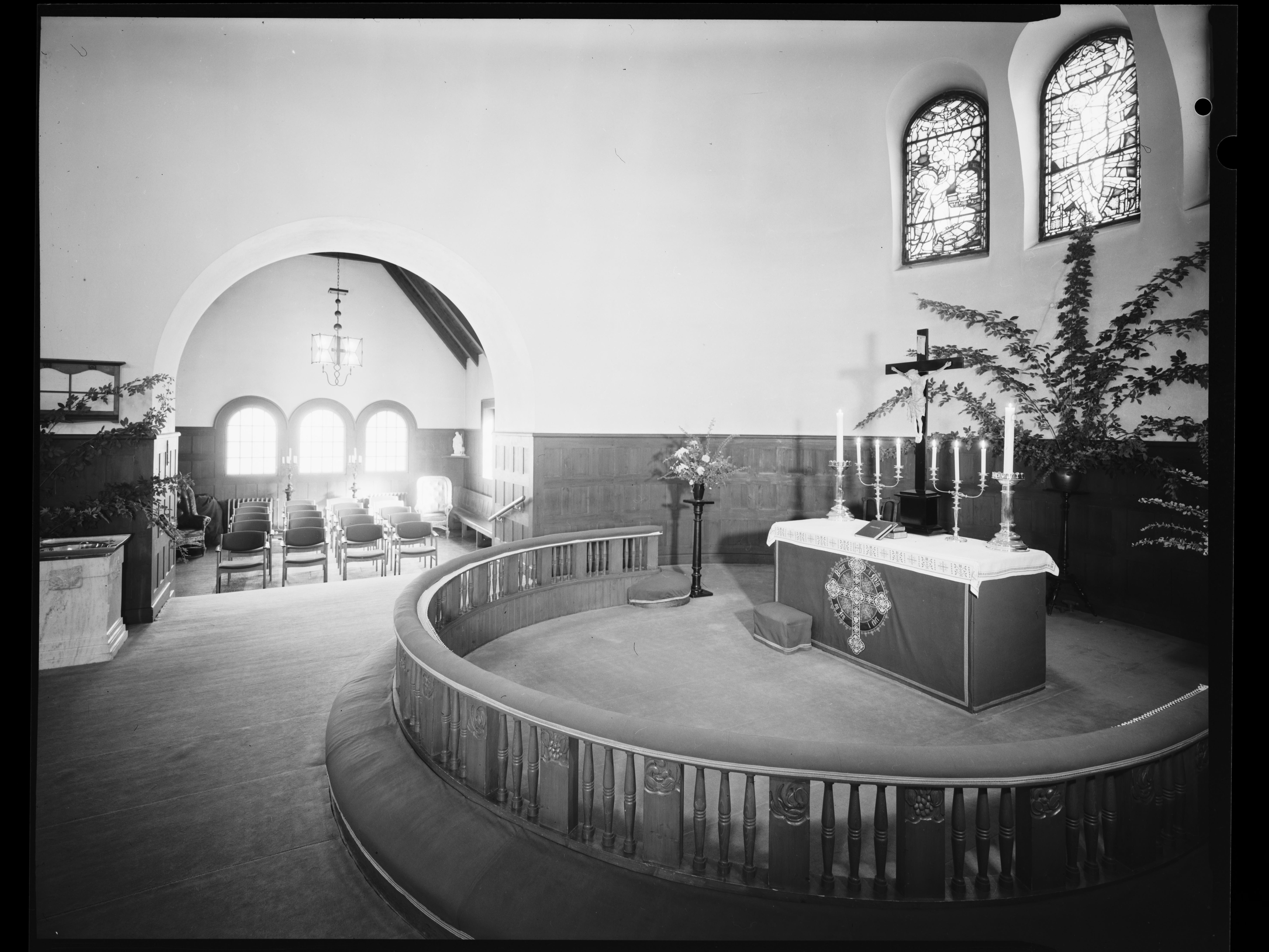 Bildet er hentet fra Nasjonalbibliotekets bildesamling Lovisenberg,Oslo, Oslo, Oslo